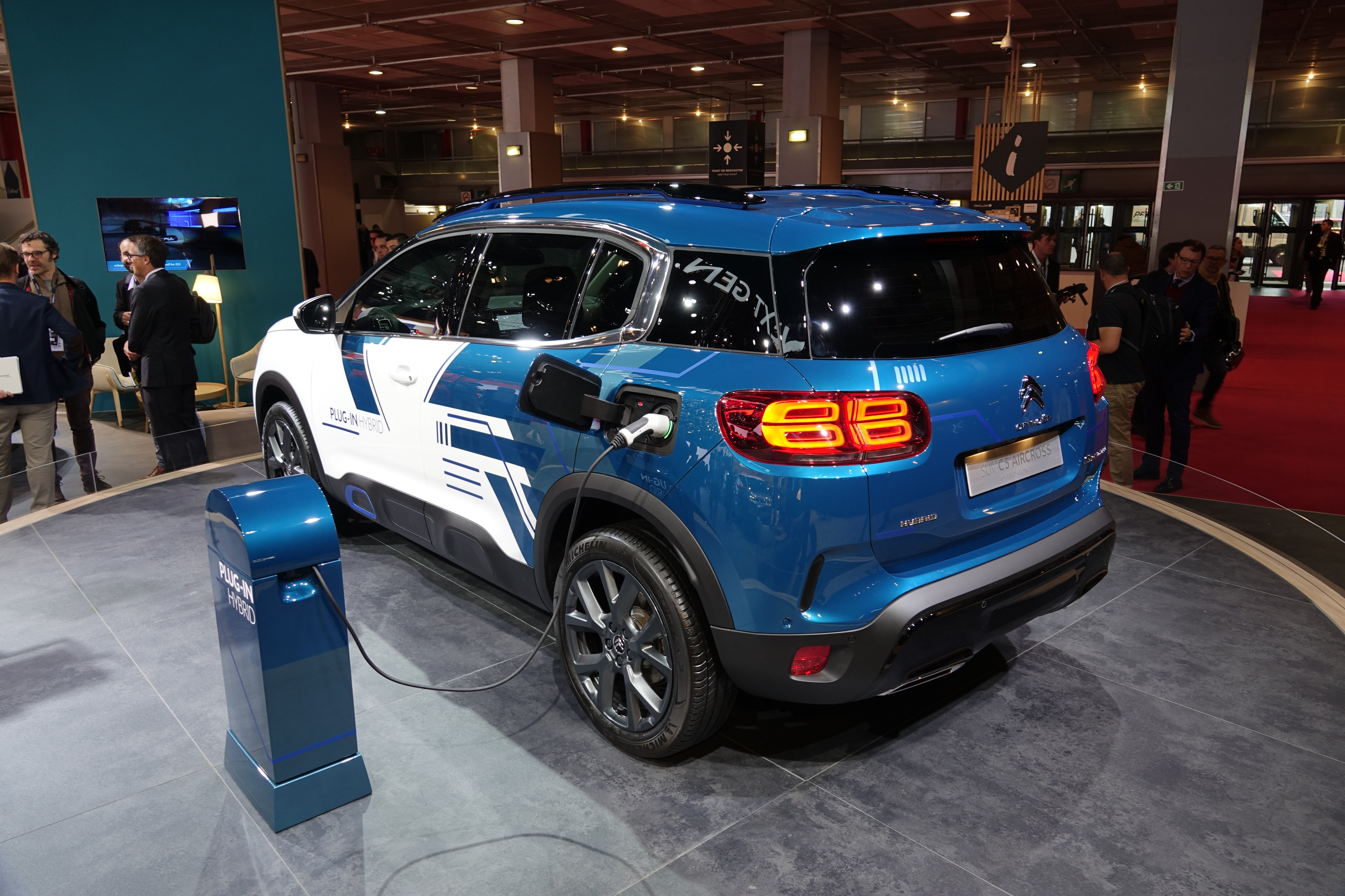 Citroën C5 Aircross hybride rechargeable concept au Mondial Paris 2018